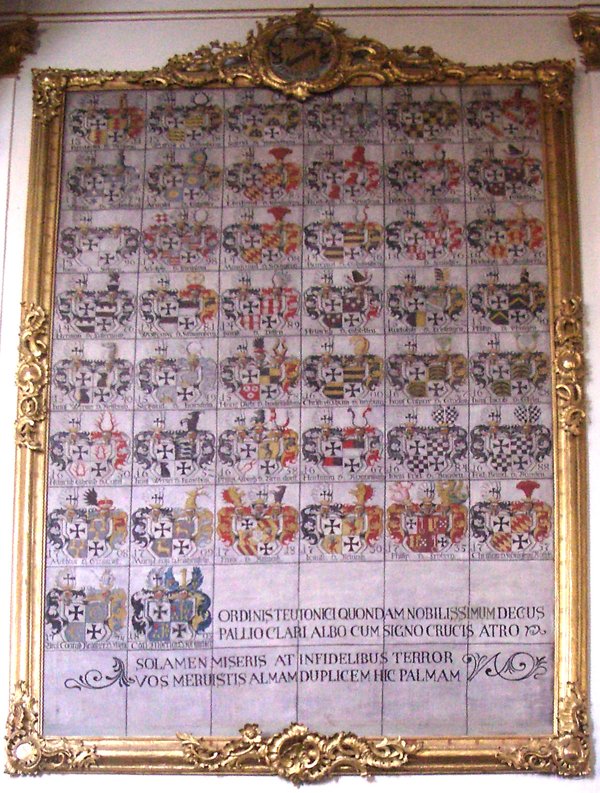 Altshausen, Germany: Schlosskirche, Wappentafel der Deutschordensritter